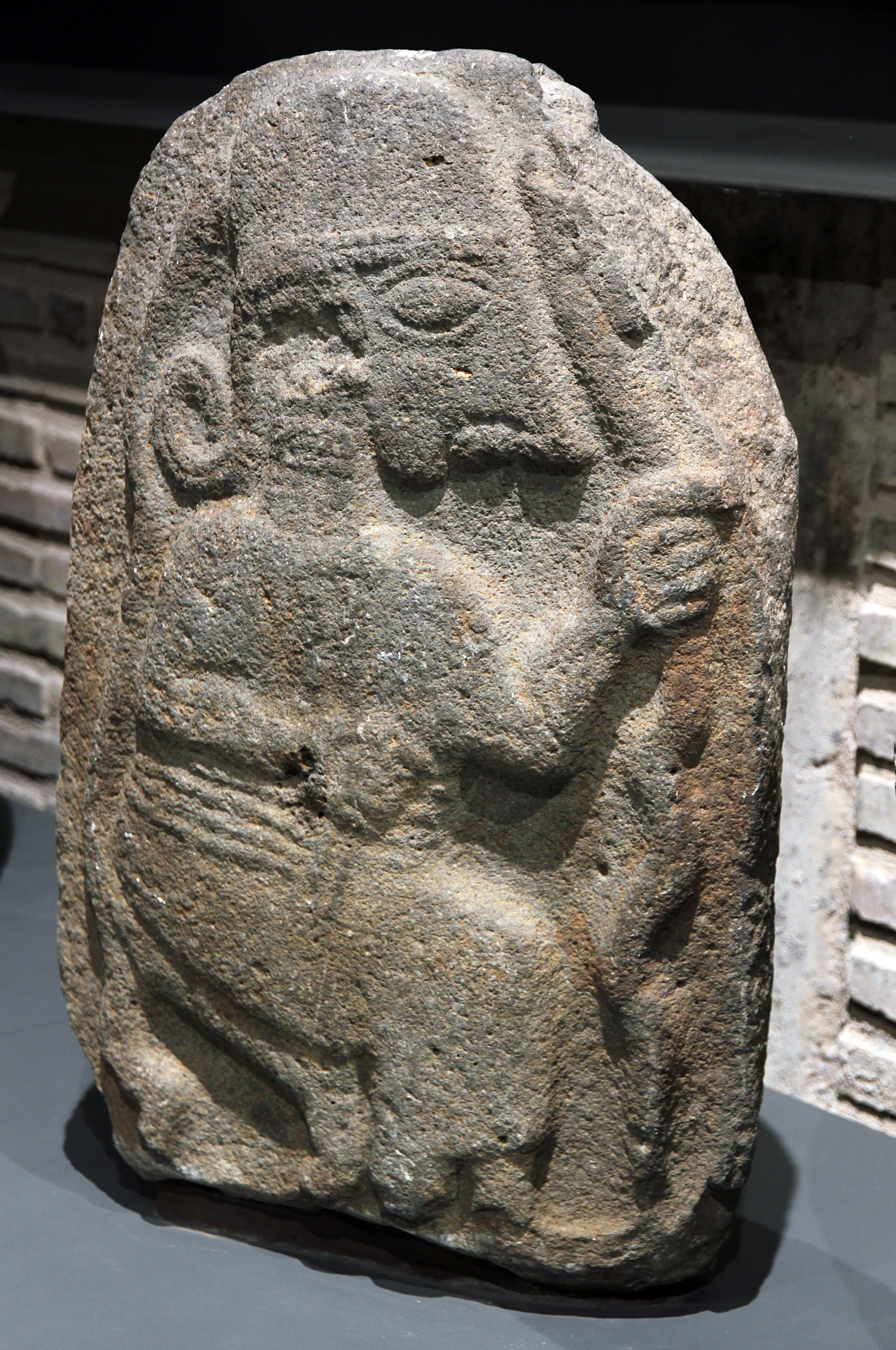 Archäologisches Museum Adana, Südtürkei, späthethitische Stele İslahiye 1